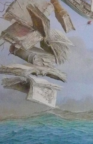 Ausschnitt aus dem Gemälde von H.-P. Wirsing "Schiff und Federkiel - Traum des Schreibers, ein Seestück zu erfinden, Mischtechnik auf Leinwand, 1995